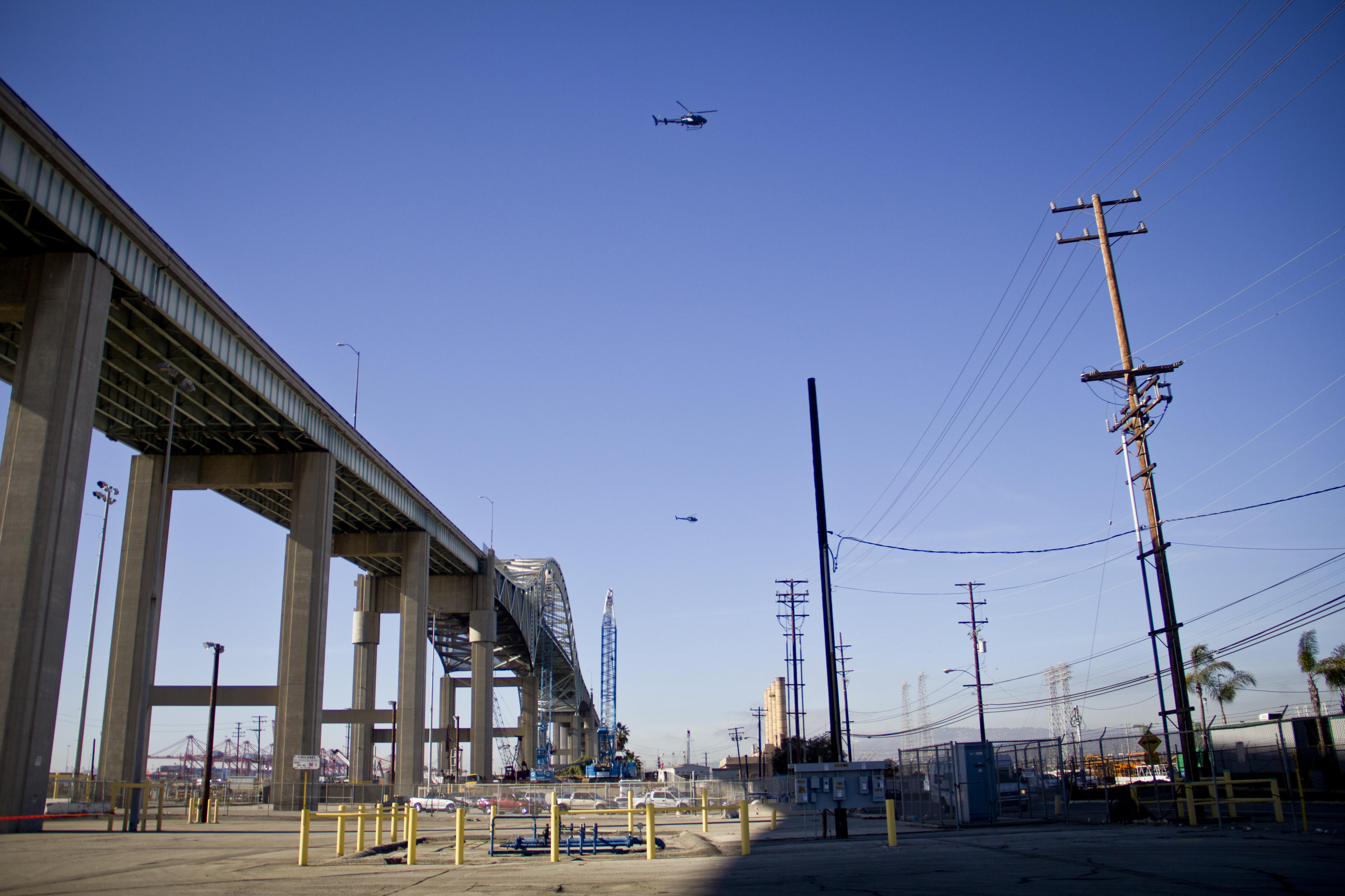 (Rosa Trieu/Neon Tommy)